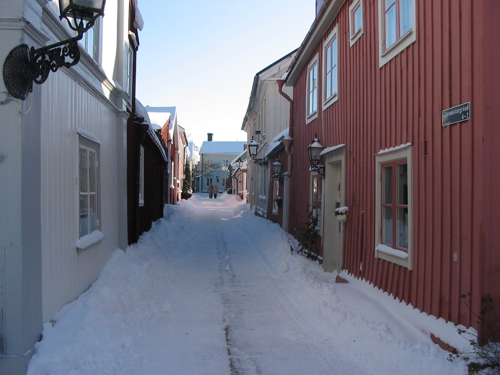 Glasmästargränd, Gamla Gefle, Gävle. (Glasmästargränd, Old town, Gävle, Sweden.) Carmen Hevia